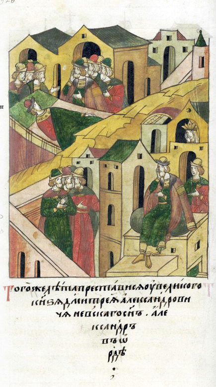 ЛИЦЕВОЙ ЛЕТОПИСНЫЙ СВОД В том же году преставился у великого князя Дмитрия Александровича Невского сын Александр в Орде.